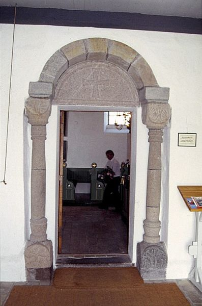 Kobberup Kirke, sydportal